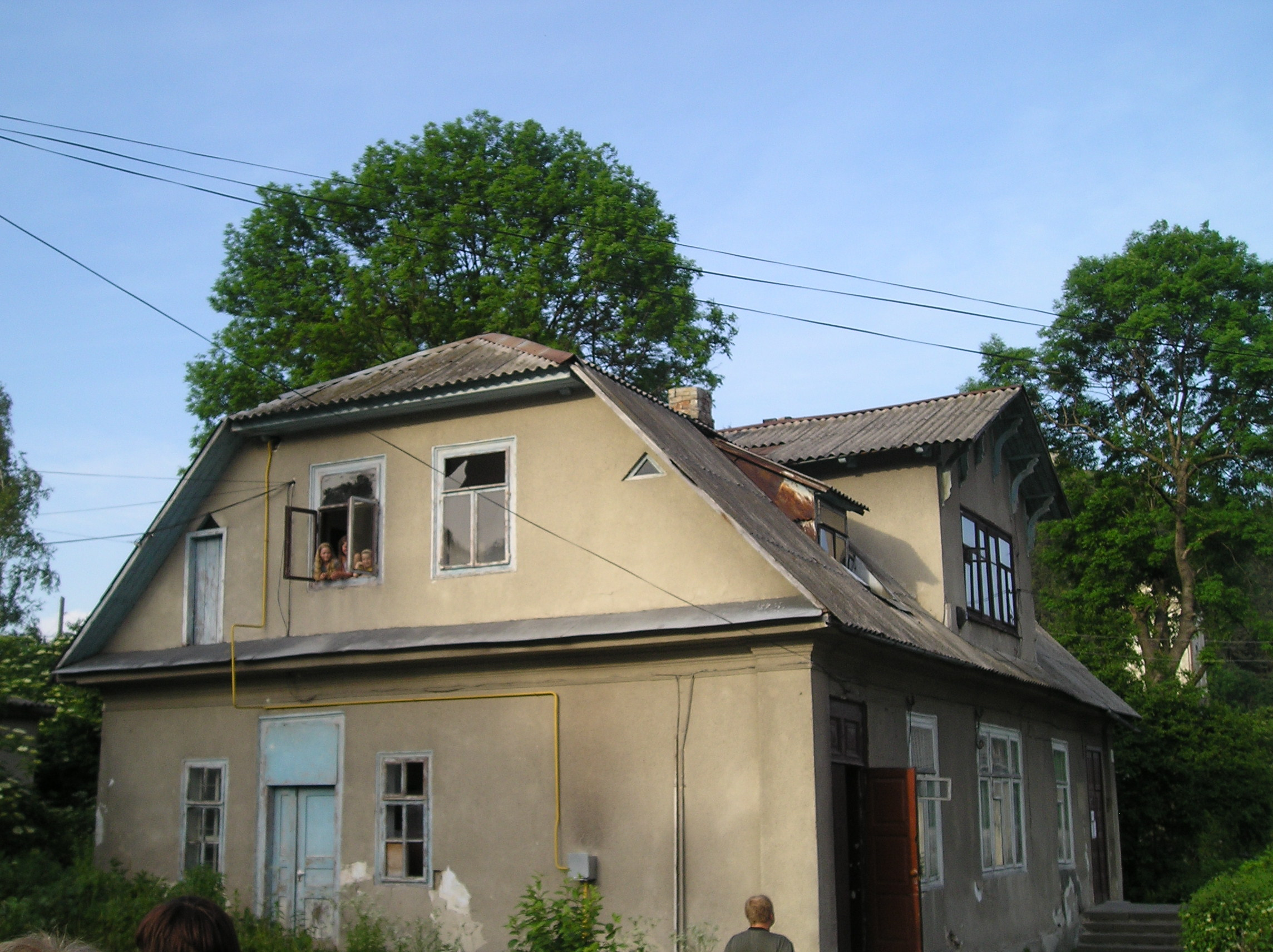 Polska szkoła w Krzemieńcu